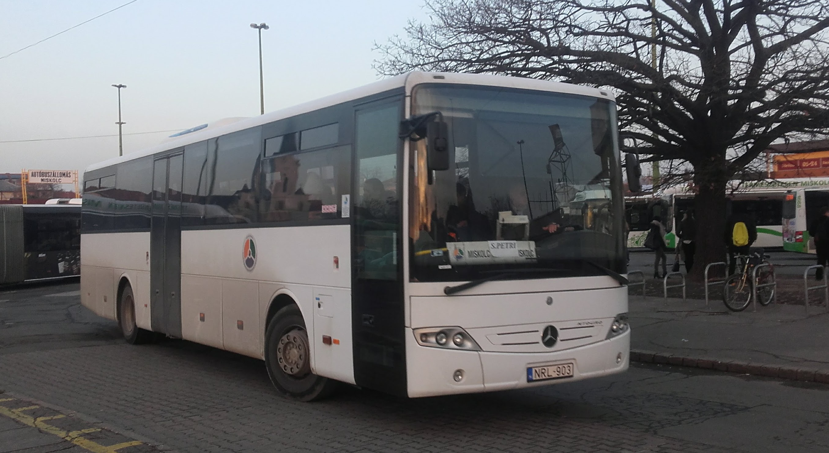 Az ÉMKK NRL-903 rendszámú Mercedes Intouro busza Miskolcon, a 3735-ös helyközi járaton.